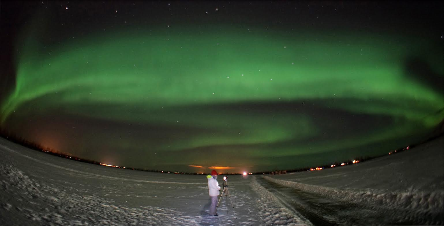 Aurora boreal en Hvolsvöllur (Islandia)